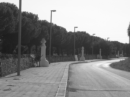 Una foto in bianco e nero della Via Delle Croci, Pozzo Faceto di Fasano (BR)